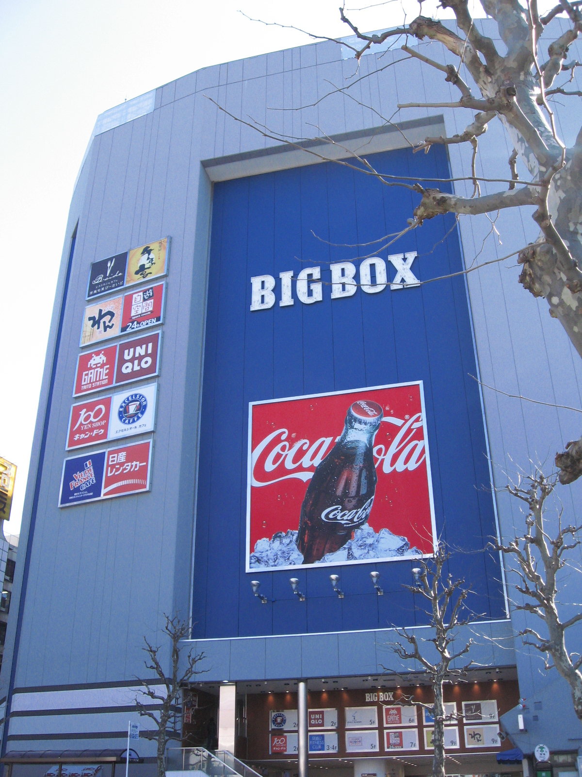 BIG BOX buildings from Takadanobaba, Shinjuku Tokyo.